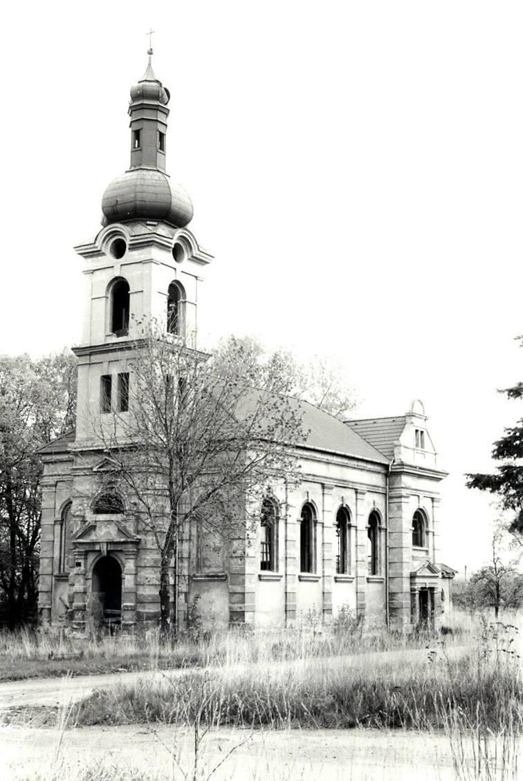 Kostel sv. Michala v zaniklé obci Libkovice, v roce 1998. Kostel byl zbourán v srpnu 2002